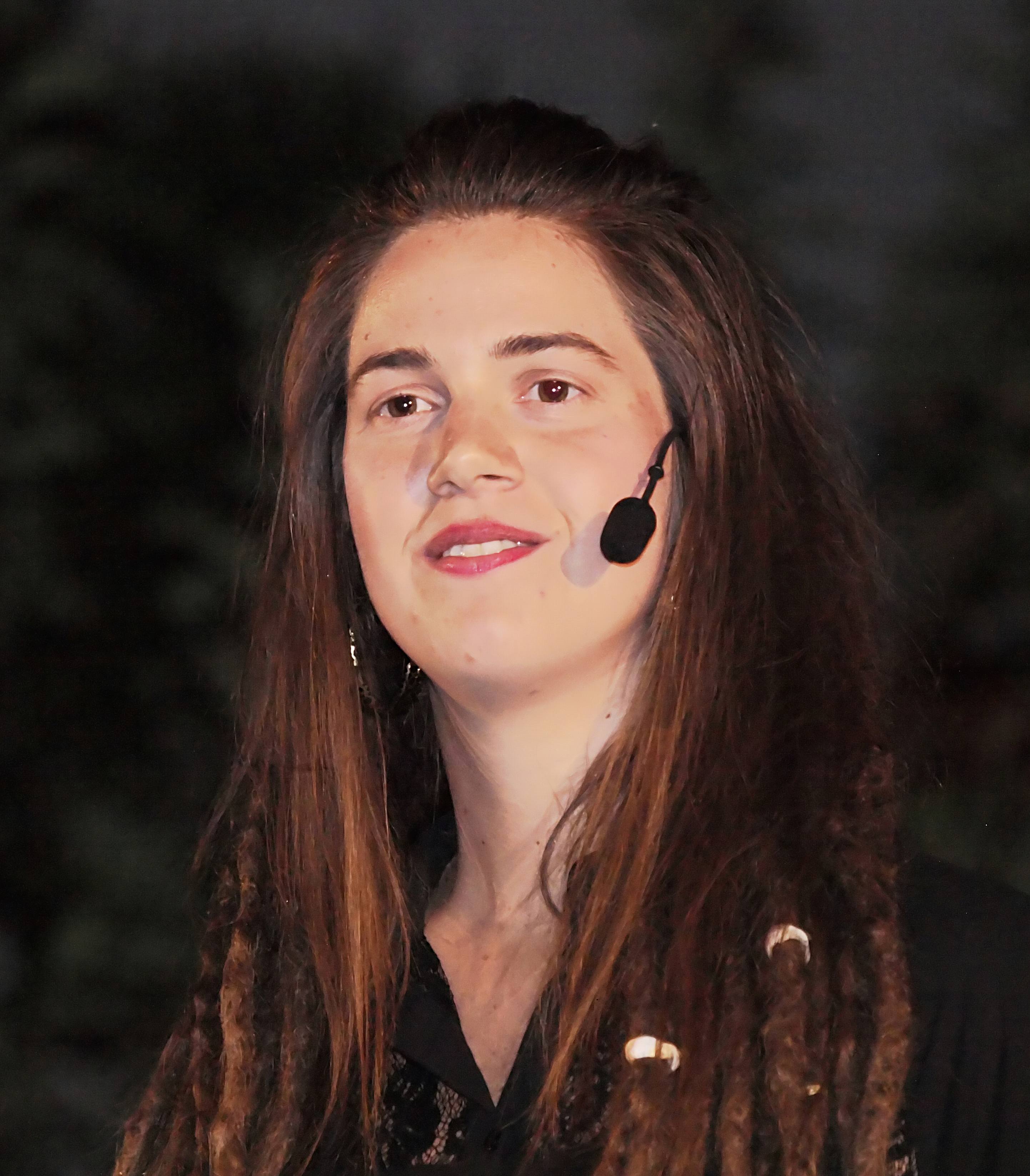 Ida Östensson, TEDx, Almedalen 2013